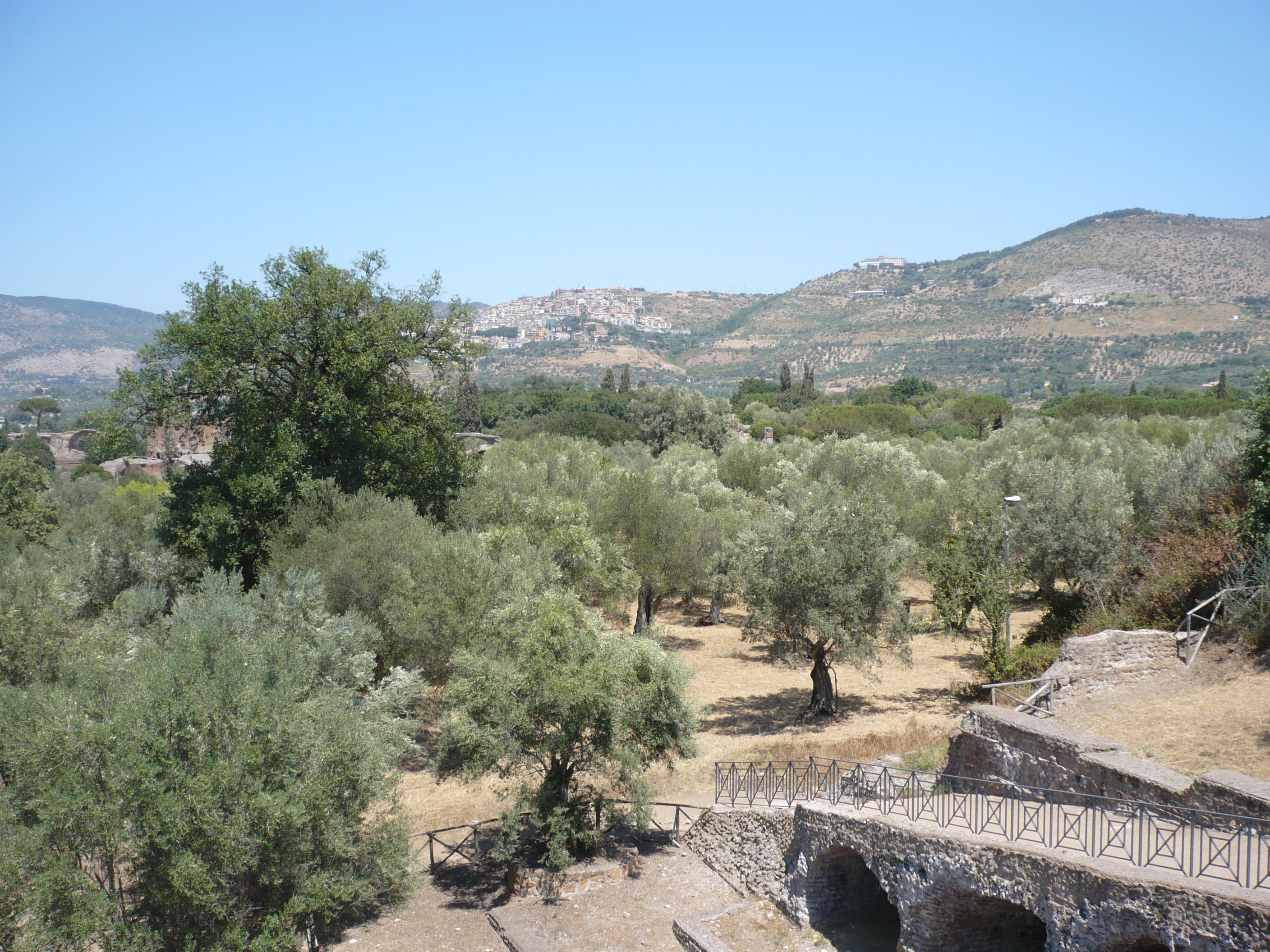 Landscape from Villa Adriana